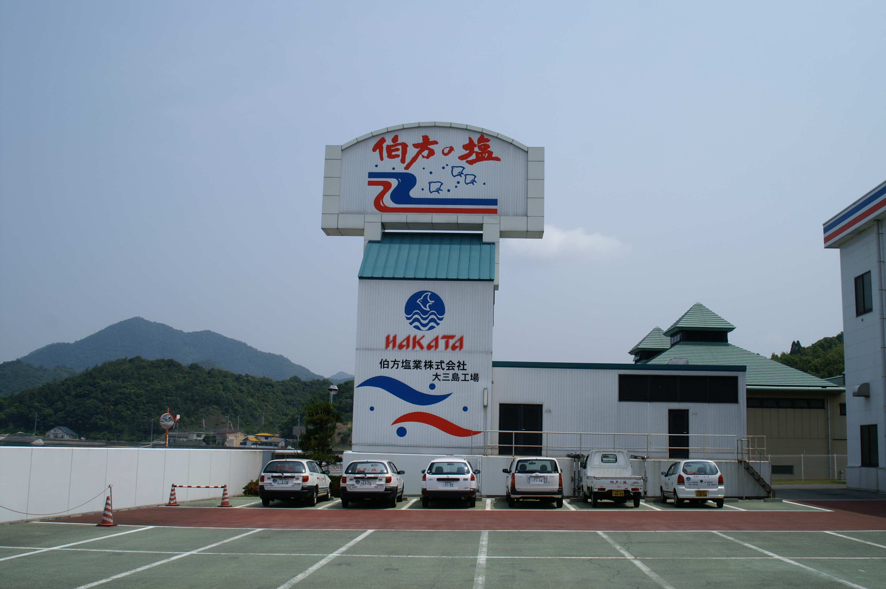 「伯方の塩」伯方塩業大三島工場（愛媛県大三島）